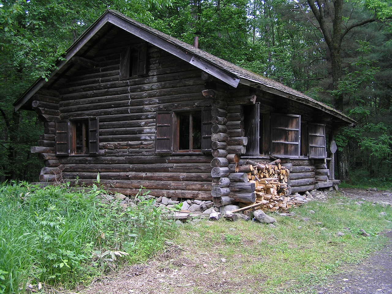 麓郷の森 黒板五郎の丸太小屋 Akiyoshi's Room